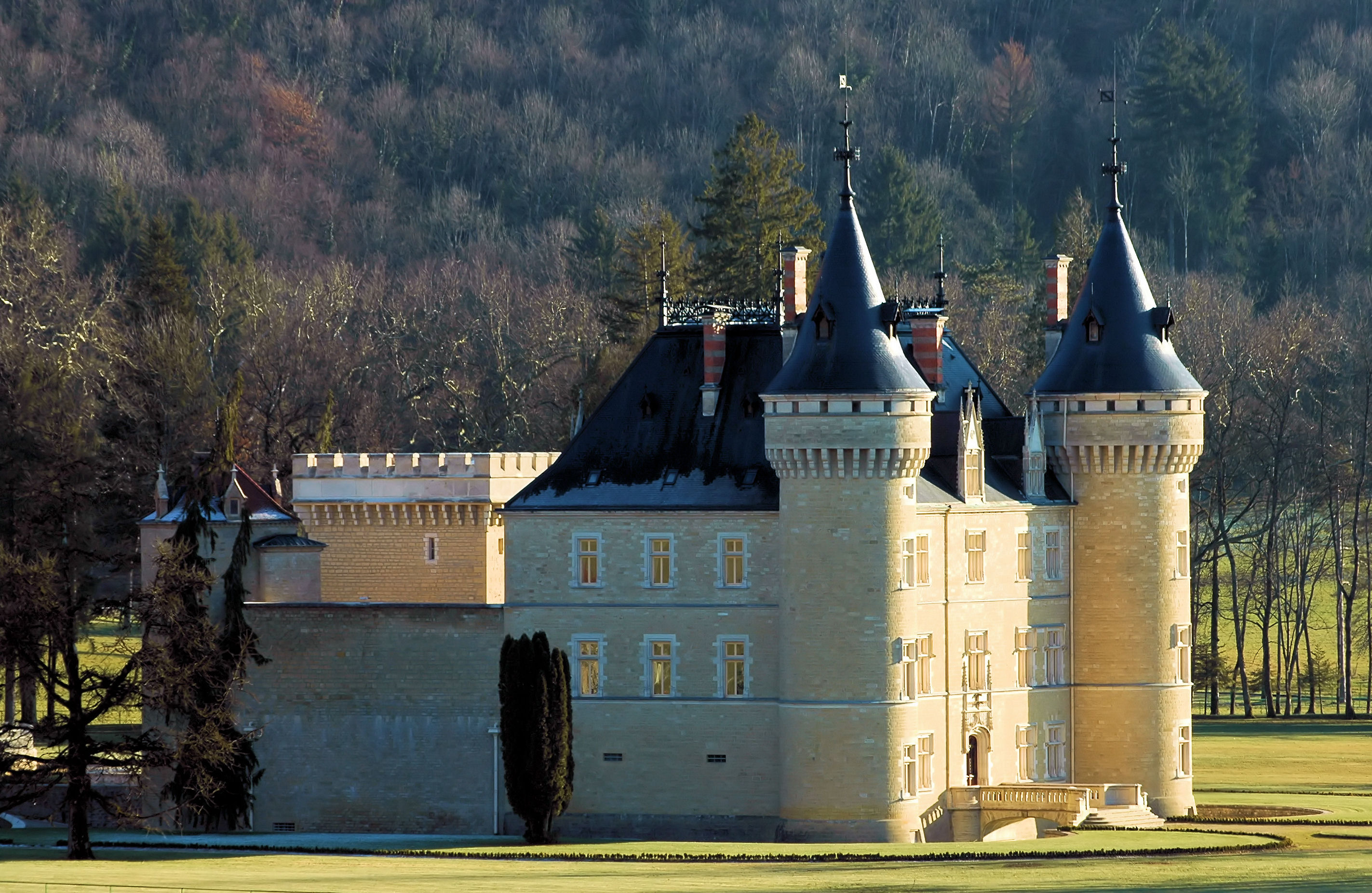 Château de Cornod (Jura, France) .